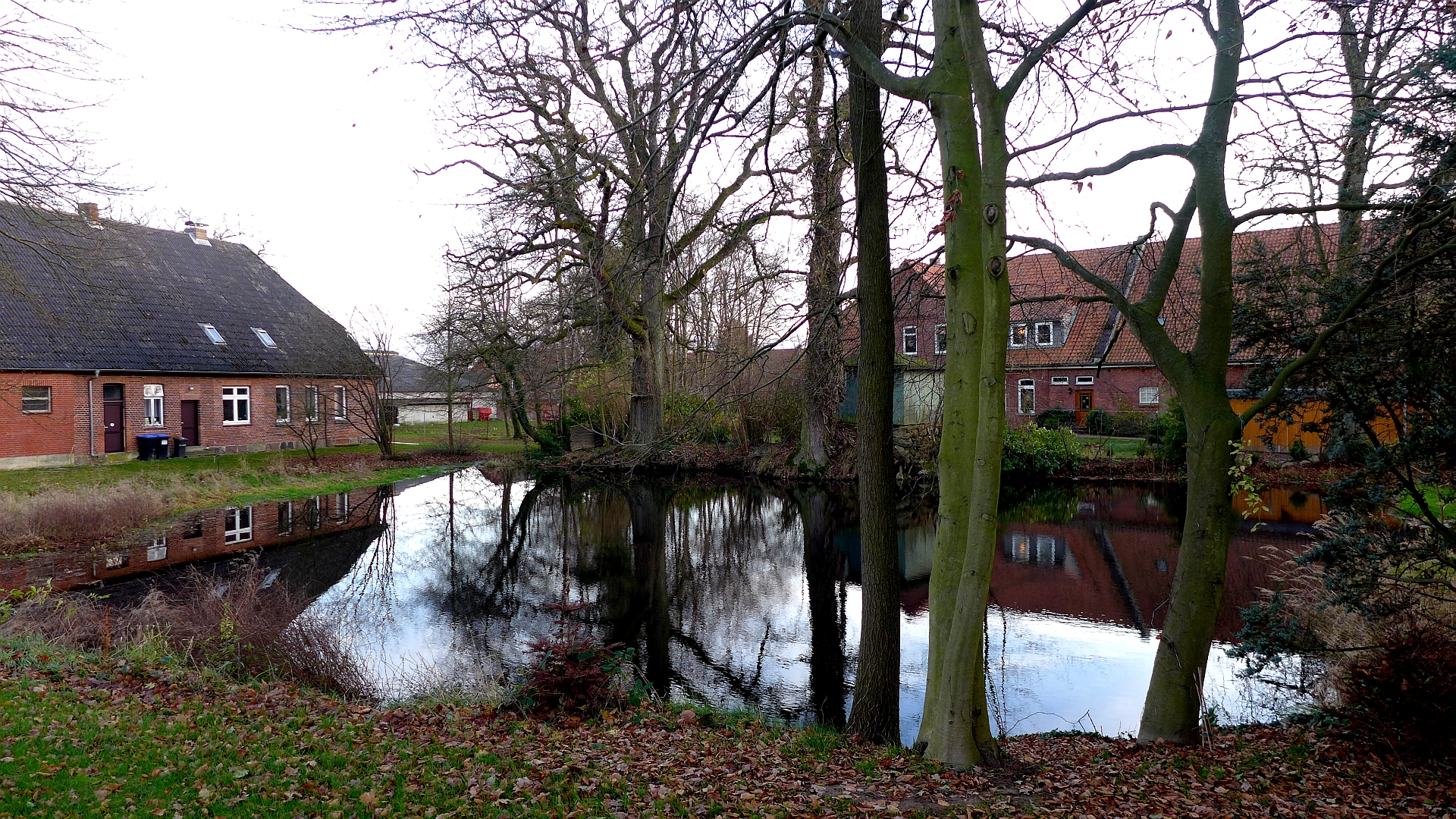 Dorfteich in Wessenstedt bei Natendorf, Landkreis Uelzen. Aufnahmedatum 2015-12.